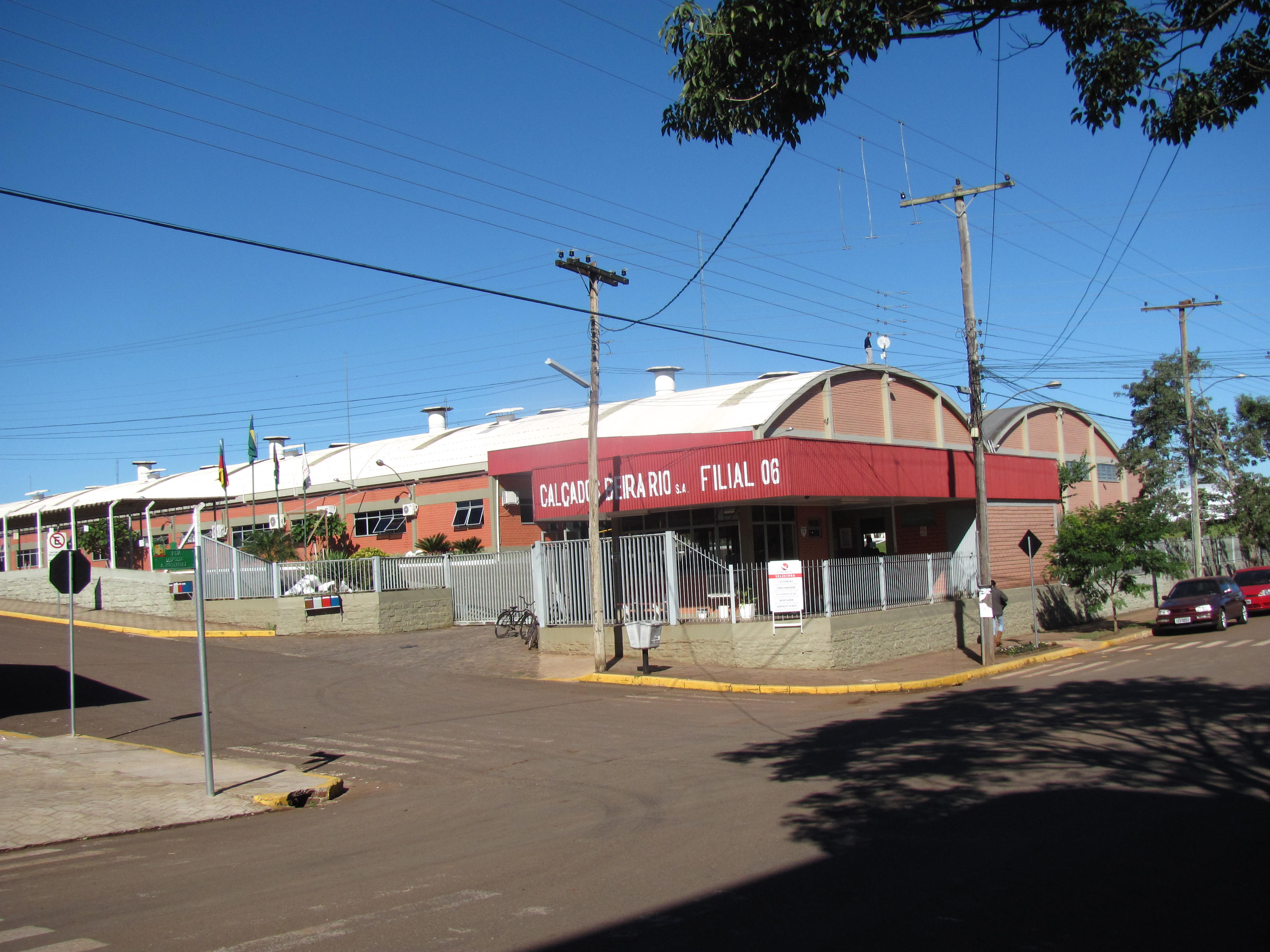 Indústria de calçados Beira Rio, unidade de Mato Leitão